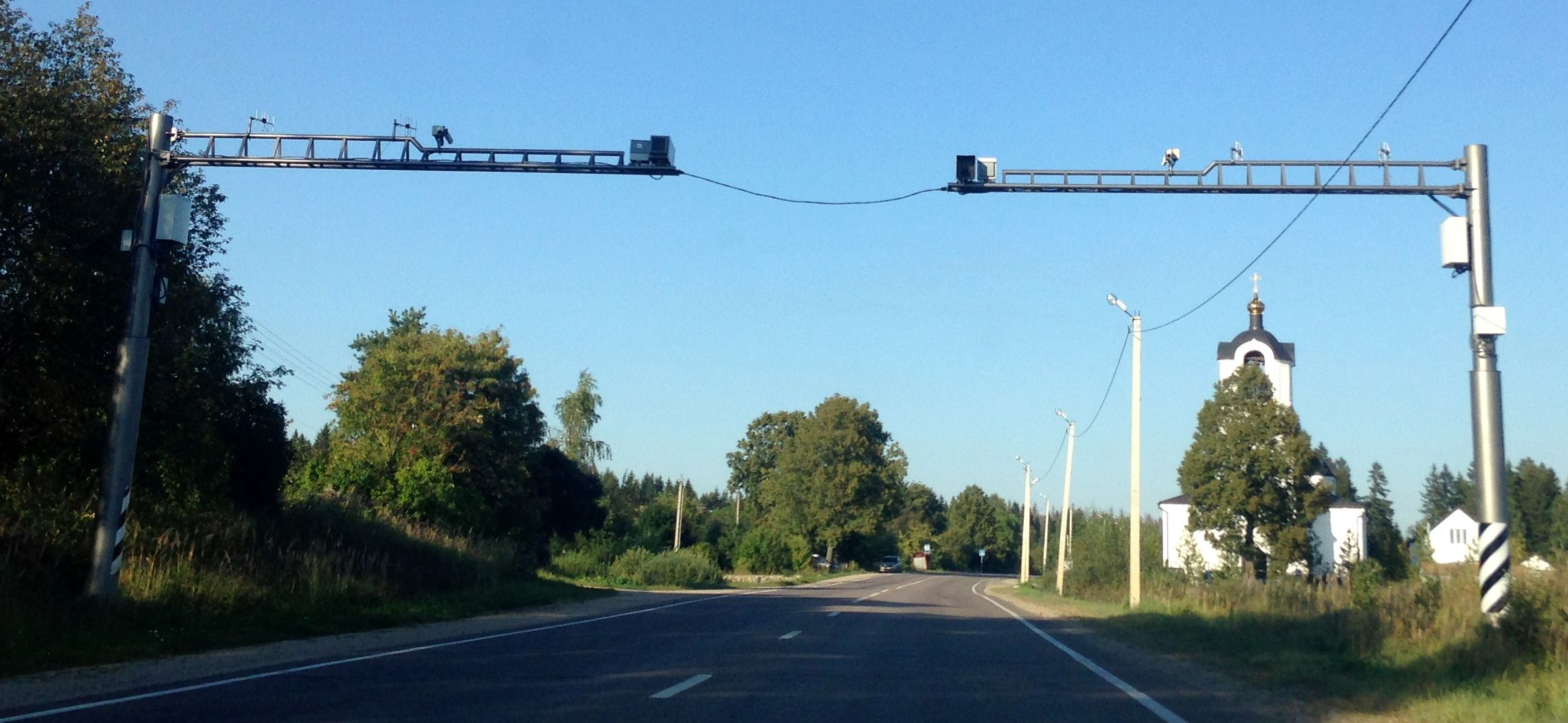 Стрелка-СТ на дороге в Локотне (Одинцовский район, Московская область, Россия).